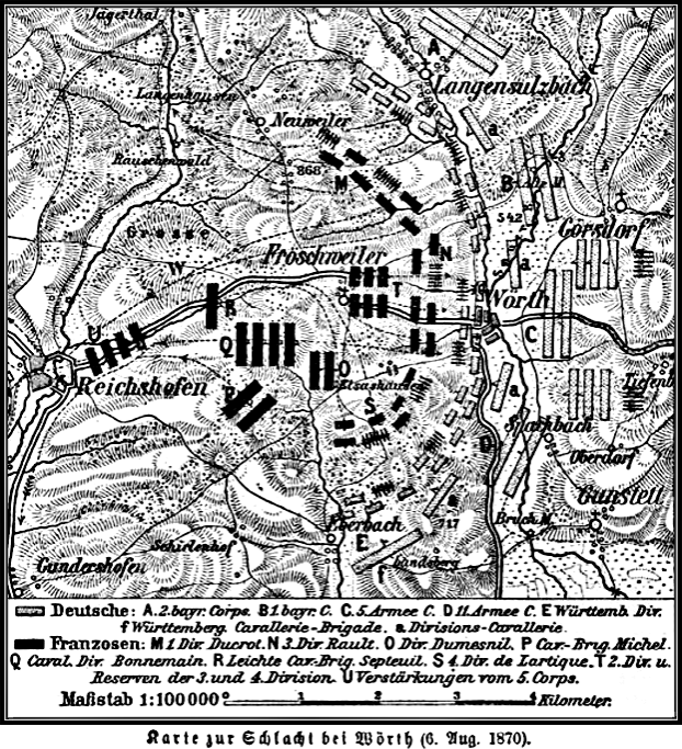 Processed version of Image:Karte zur Schlacht bei Wörth (06.08.1870).jpg